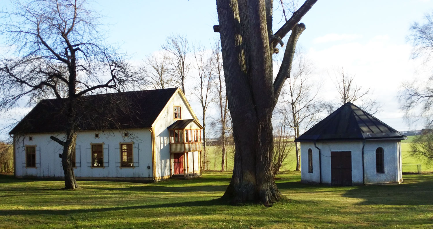 Byggnadsminne Flistads brunn, Flistad socken, Östergötland, Sverige. Byggnadsminne (BM) 3 kap. KML 1979-11-26 enligt Riksantikvarieämbetet. Bilden föreställer Källhuset och Socitetssalongen.